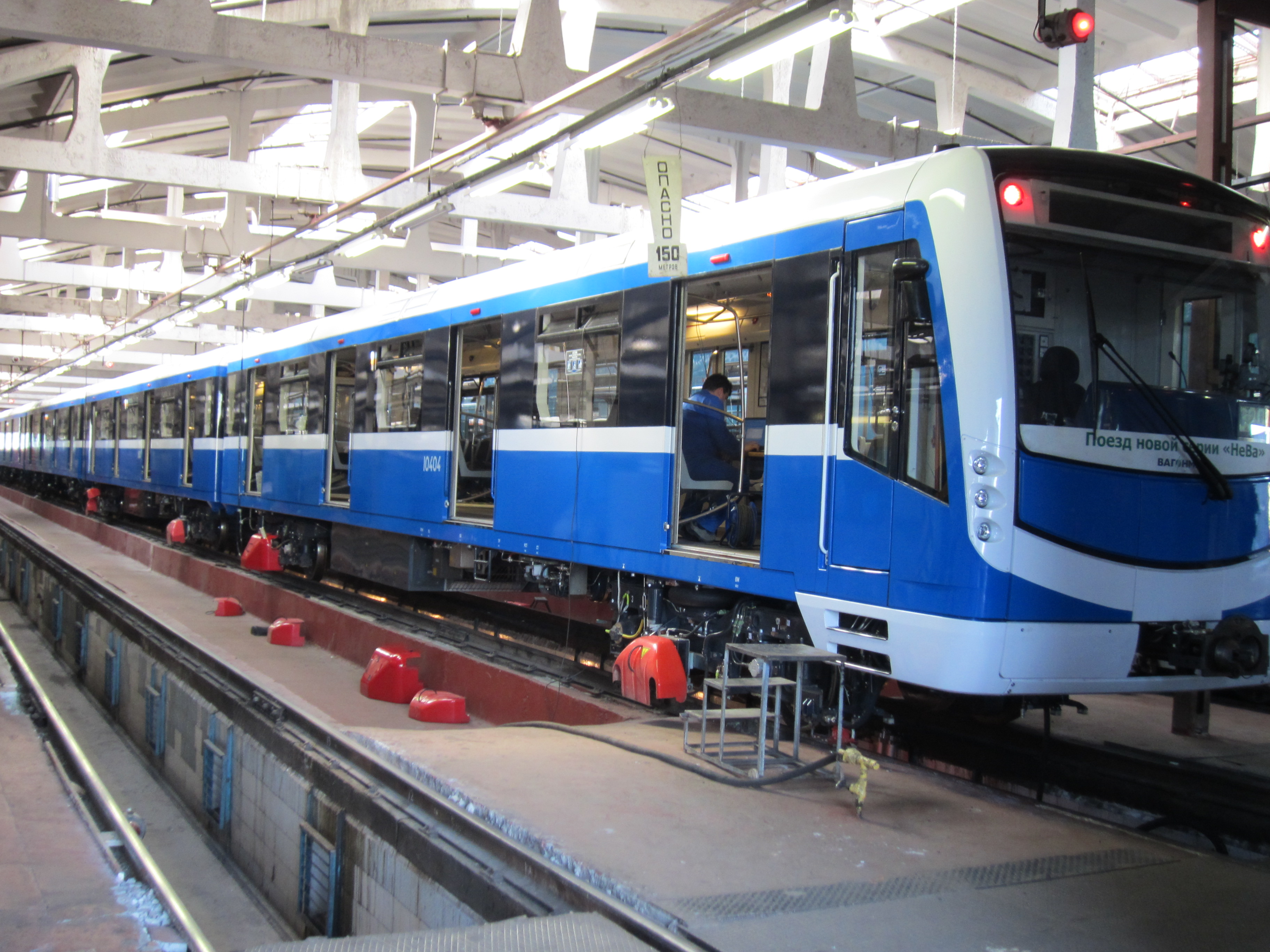 Состав из вагонов 81-556, 81-557 и 81-558 в депо Невское